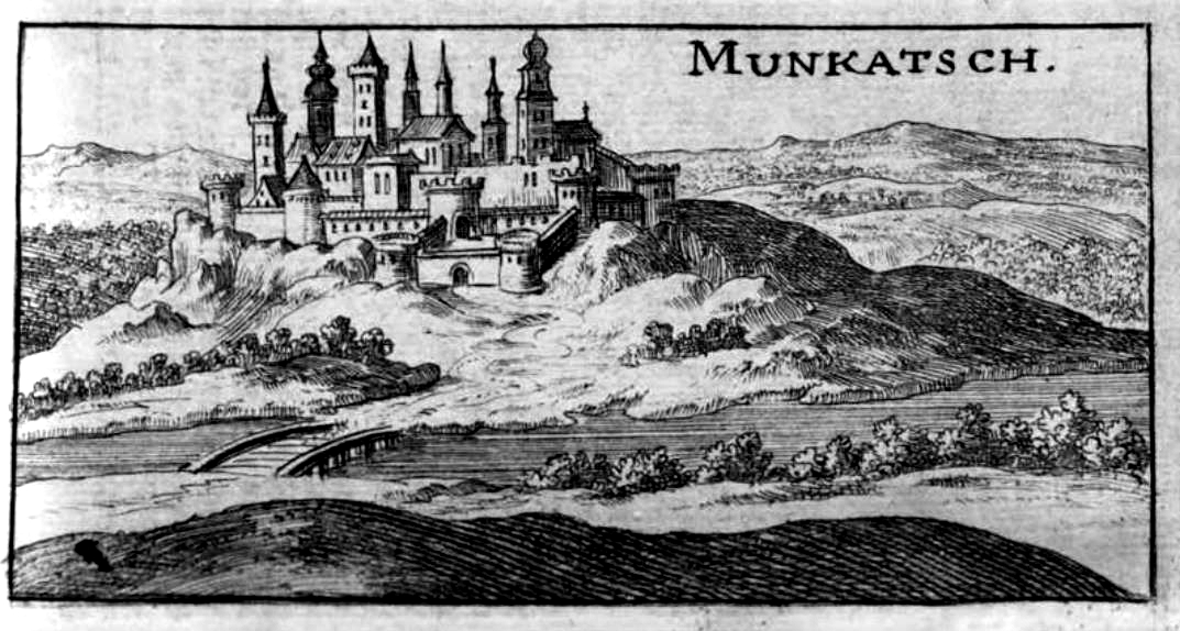 Munkács vára a "Das ehmals gedrückte, vonm Türken berückte, nun trefflich erquickte Königreich Hungarn.ˇ" című műből, Frankfurt u. Leipzig 1688